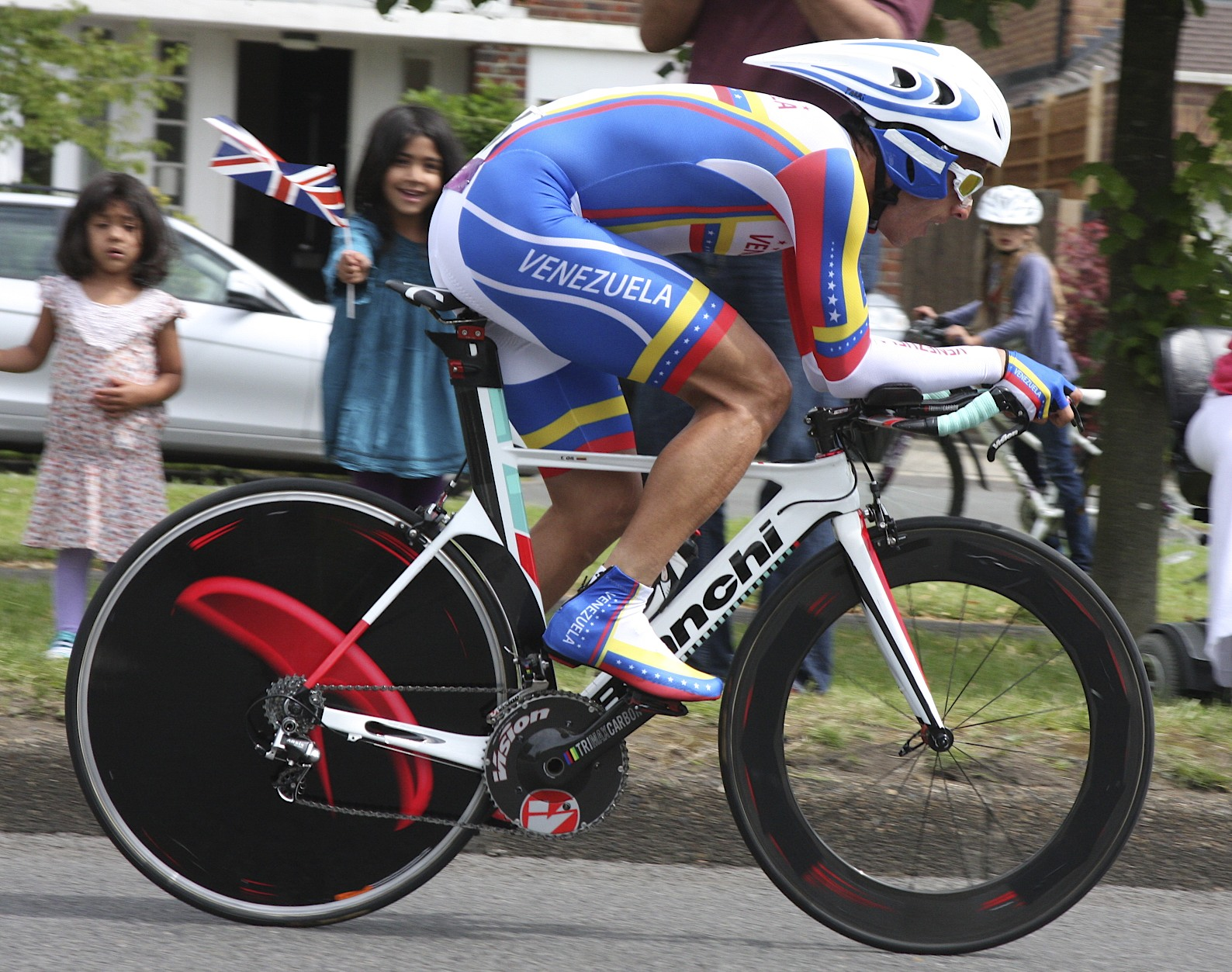 Tomas_Aurelio_Gil_Martinez_VEN